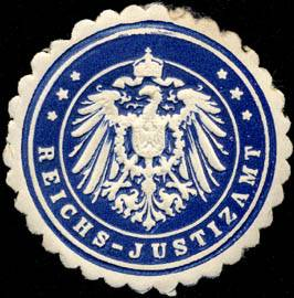 Sealing stamp Title: Reichs - Justizamt Description: dunkelblau, weiß, geprägt Place: size: 4 cm